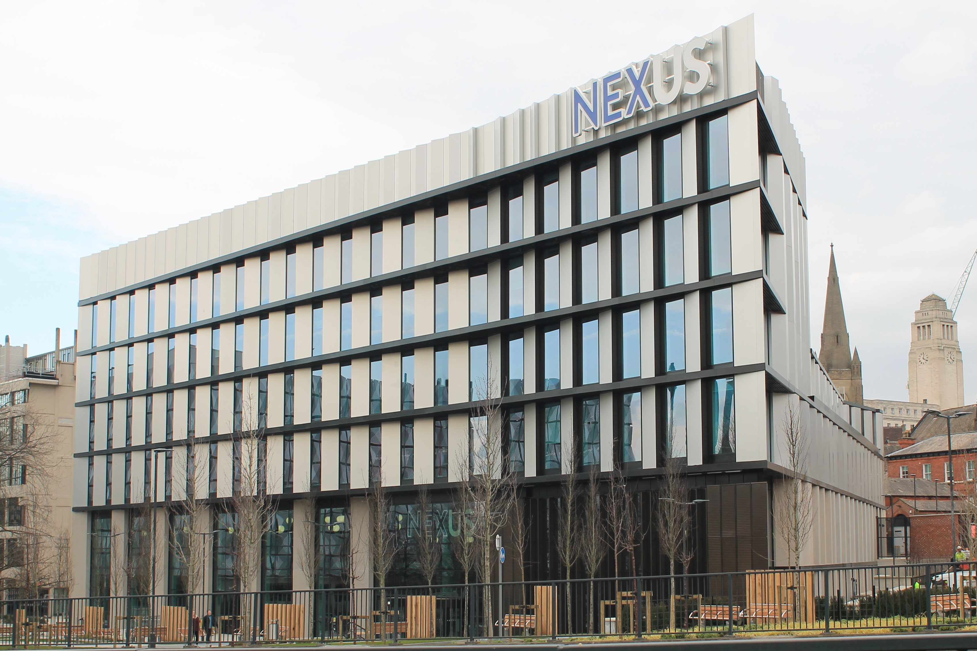 Nexus Leeds